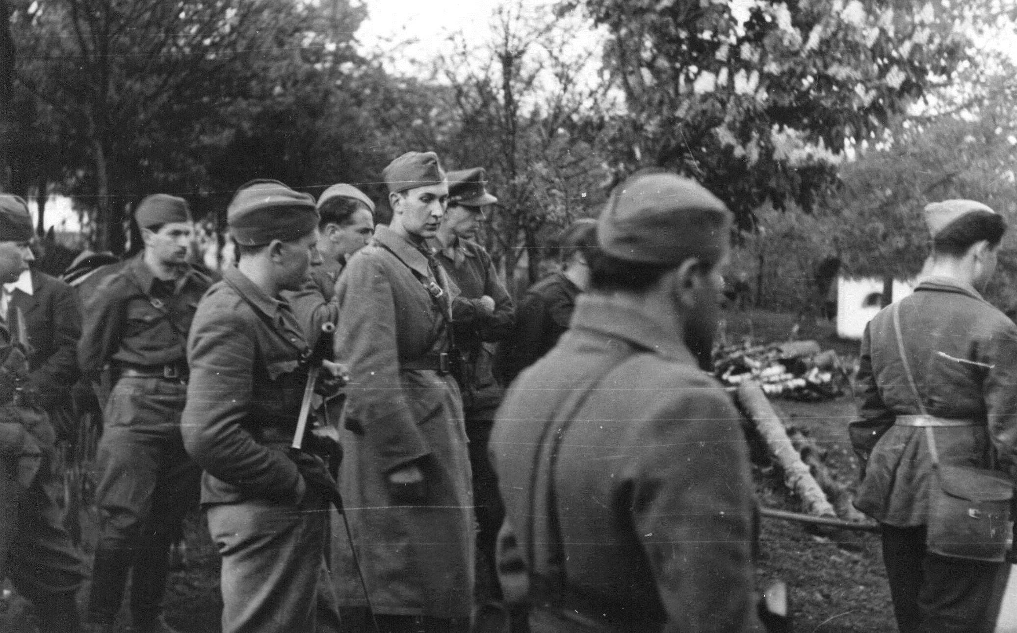 Enota IX. korpusa